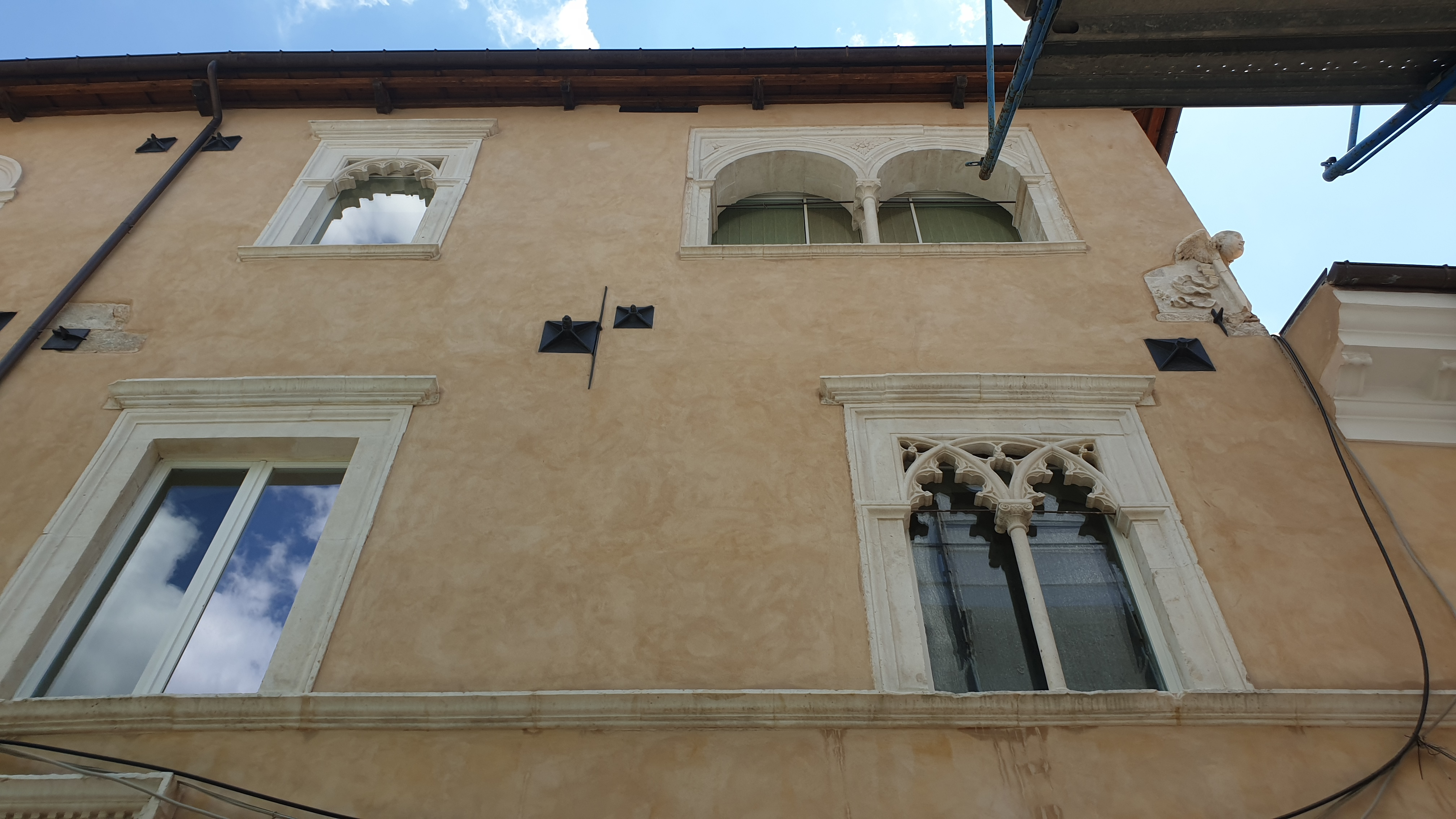 L'Aquila: Palazzo Alfieri